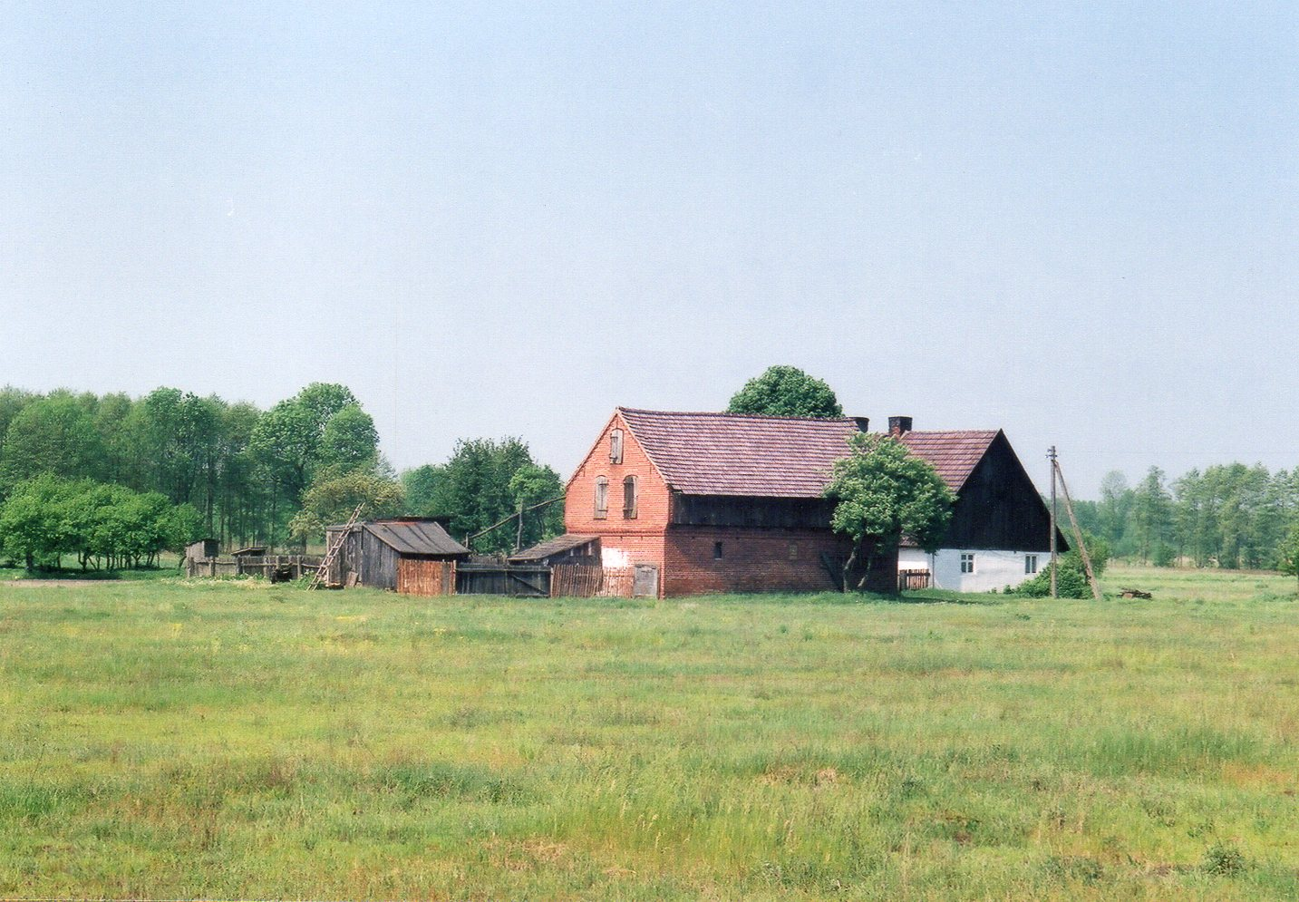 Osadnictwo olęderskie w rejonie Nowego Tomyśla i Jastrzębska oraz Paproci. Maj 2002r.